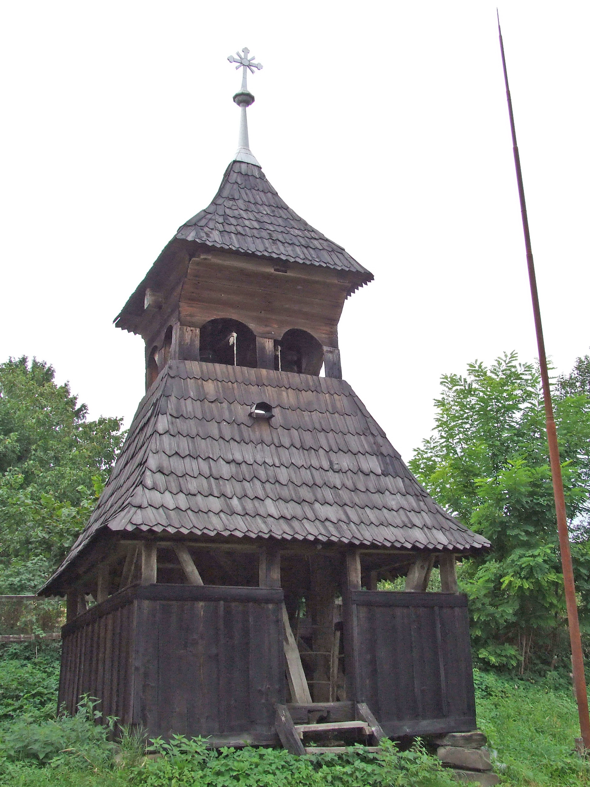 Biserica de lemn din Culpiu, judeţul Mureş.